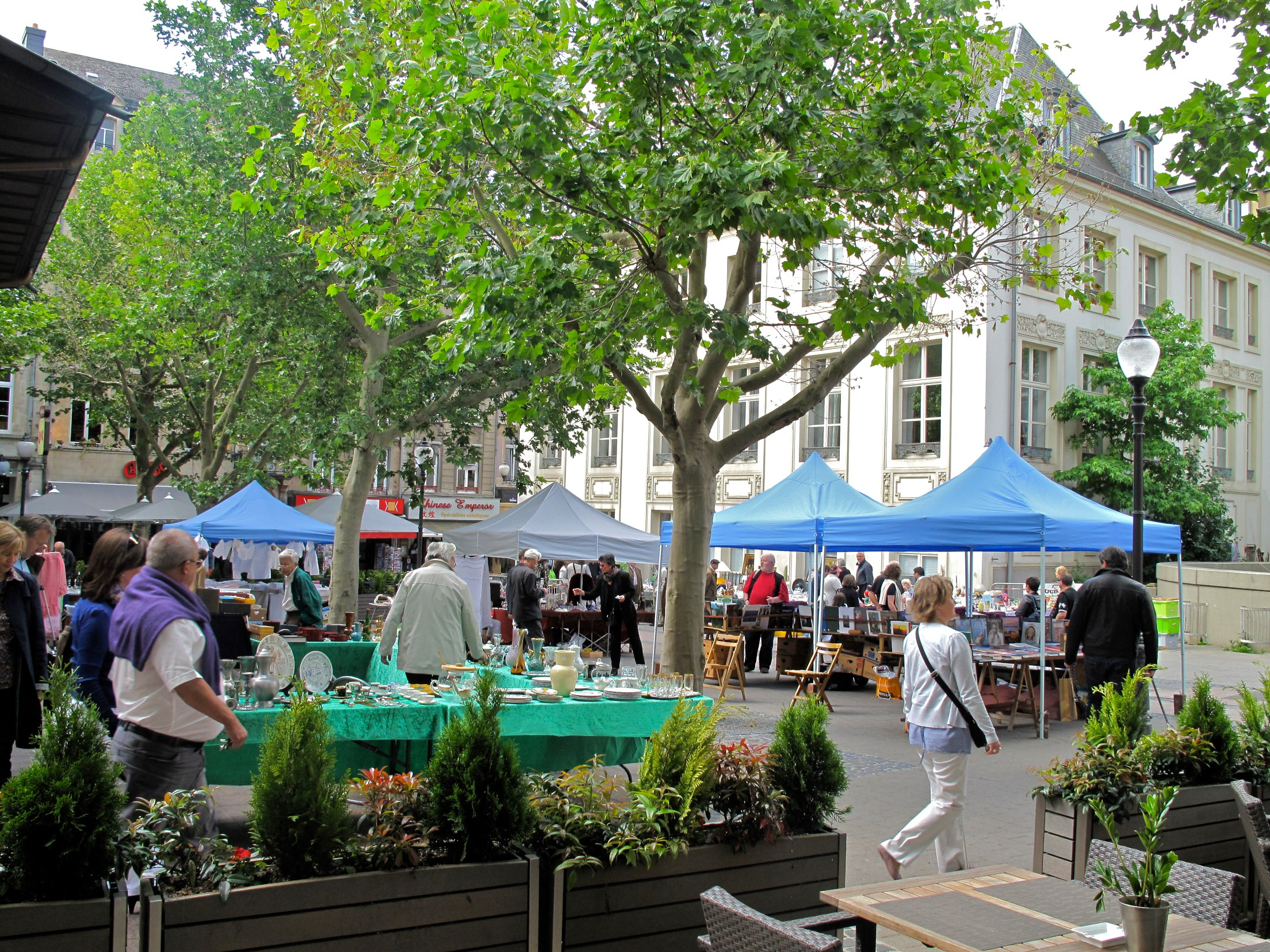 Luxembourg mai 2011 19